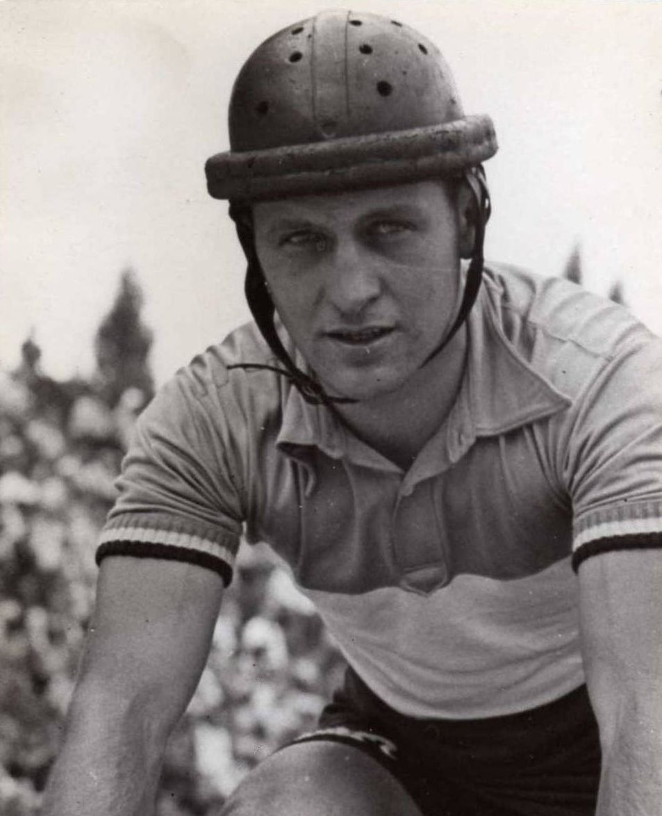 Jean-Jacques Lamboley, cycliste professionnel sur piste de 1946 à 1951